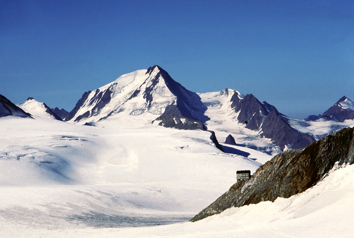 Brandenburger Haus mit Weißkugel